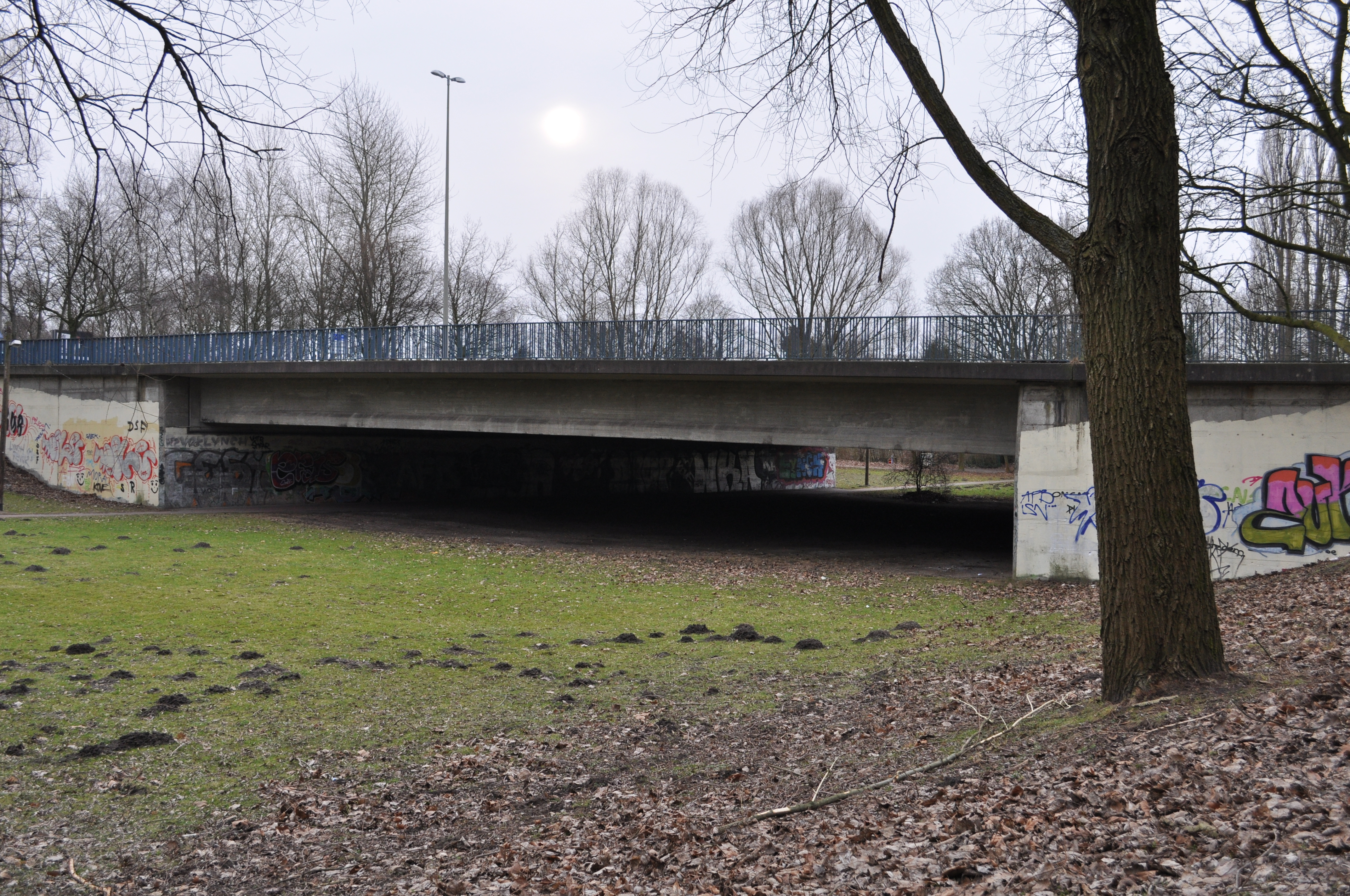 Brücke im Zuge der Straße Jahnbrücke in Hamburg-Winterhude über die geplante Trasse der Autobahn 25.